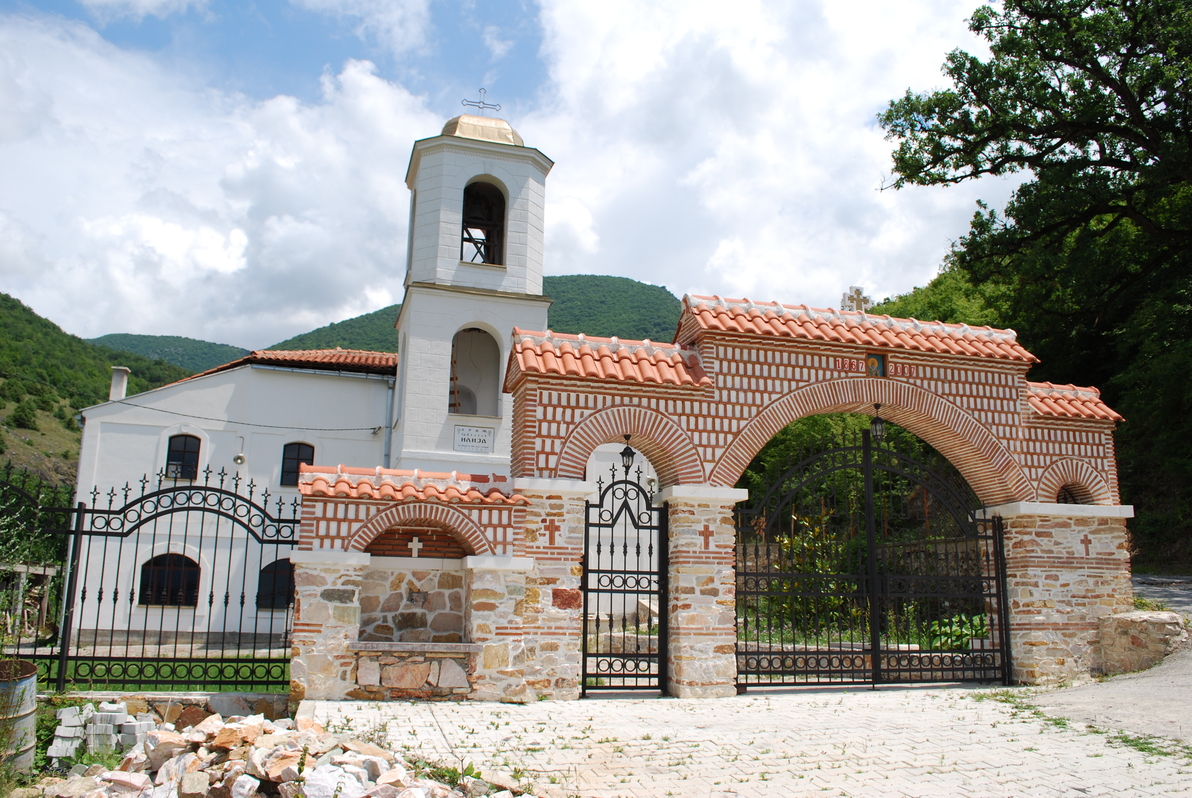 Црквата Св. Илија во Стенче, Тетово, Македонија